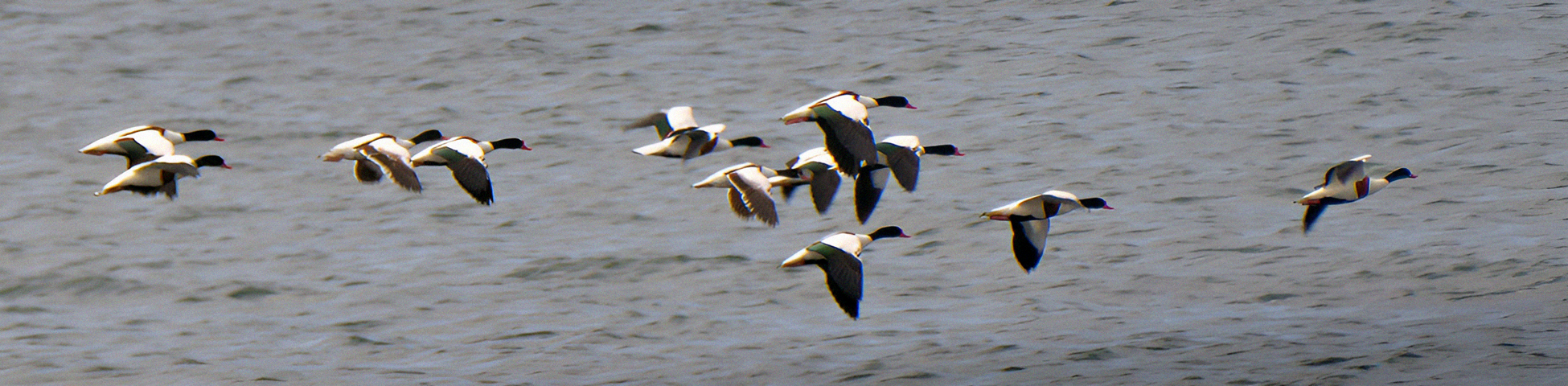 Gravand sträckar väst. Världens ände Ystad 2017.